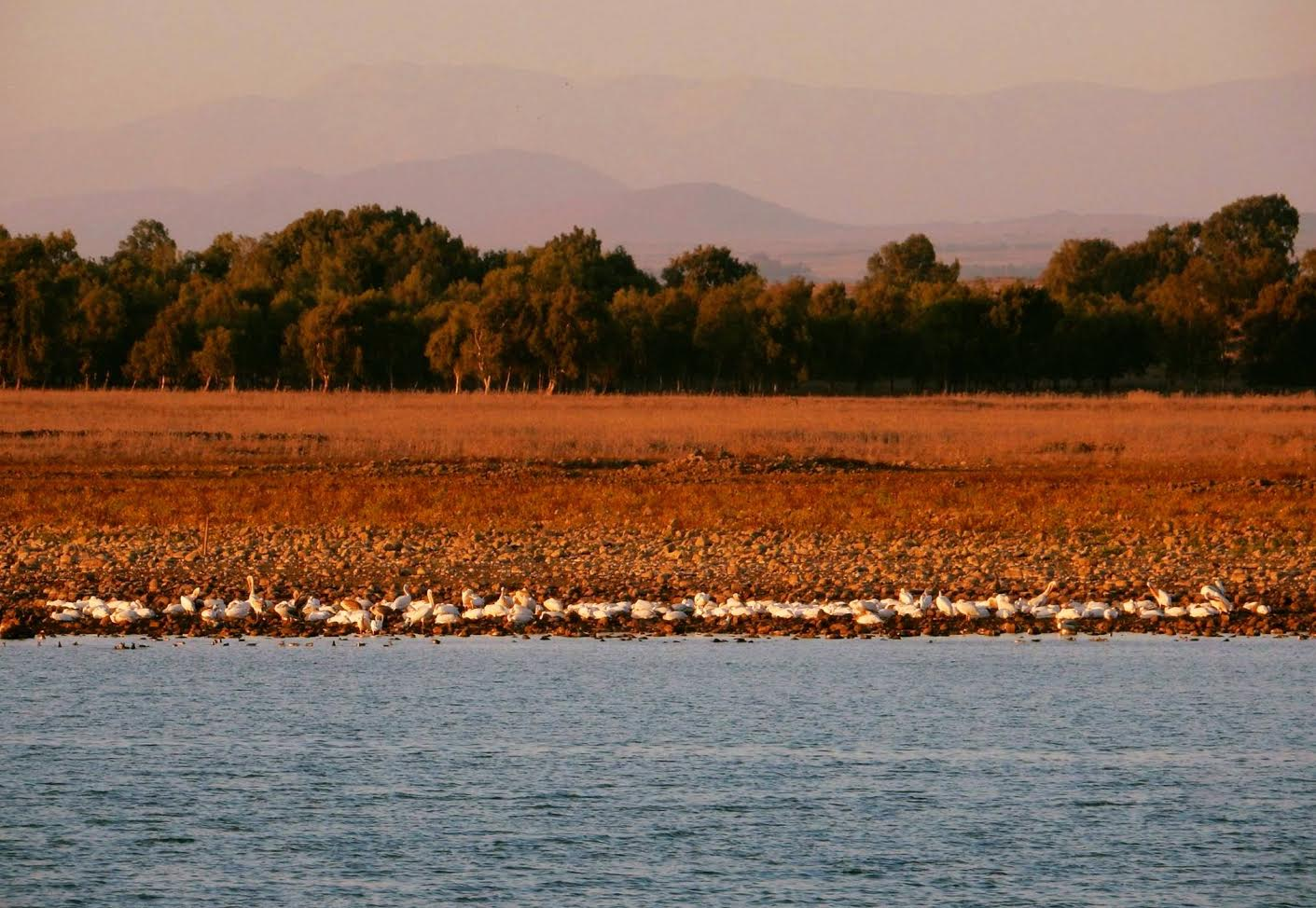 מאגר בני ישראל - שקנאים וברקע החרמון